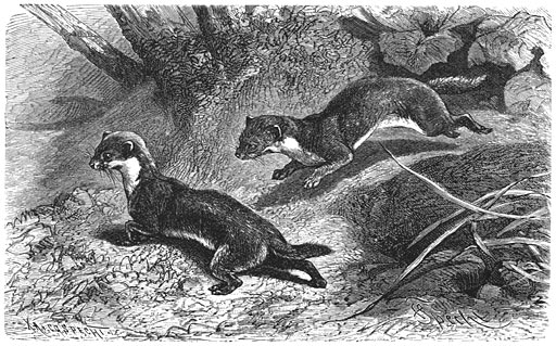 Wezel (Putorius vulgaris) in haar zomerkleed. Currently: Mustela nivalis vulgaris